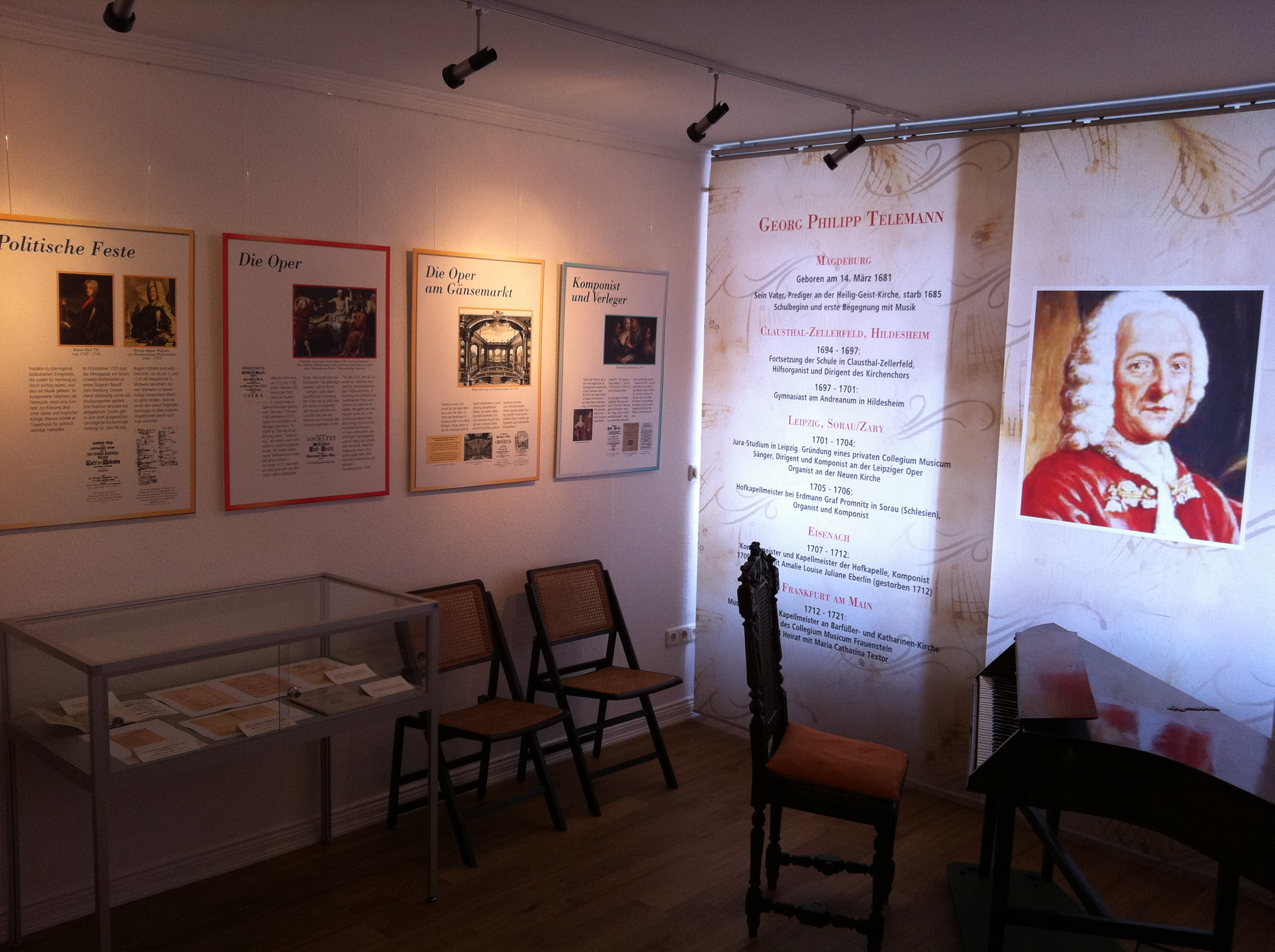 Innenansicht des Telemannmuseums in der Peterstraße in Hamburg.